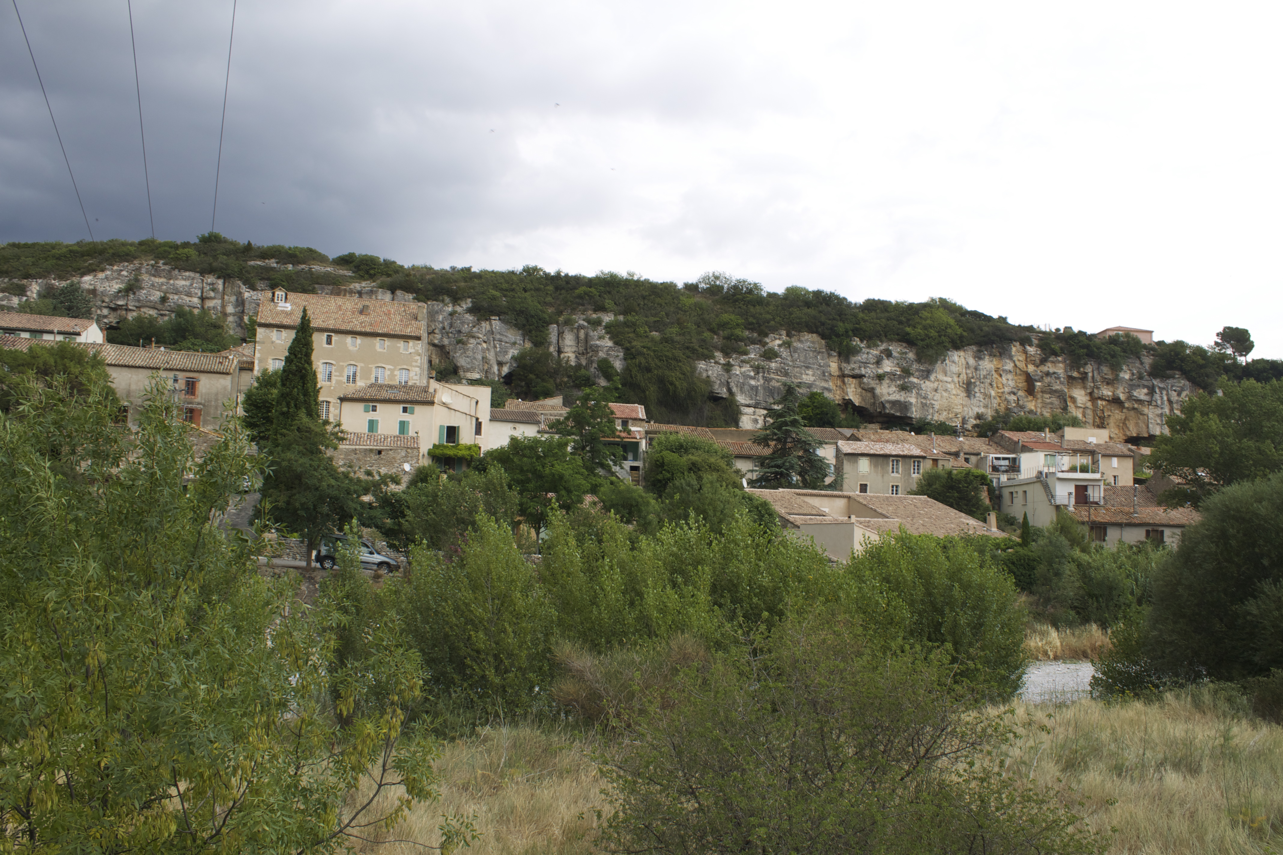 La Caunette, France